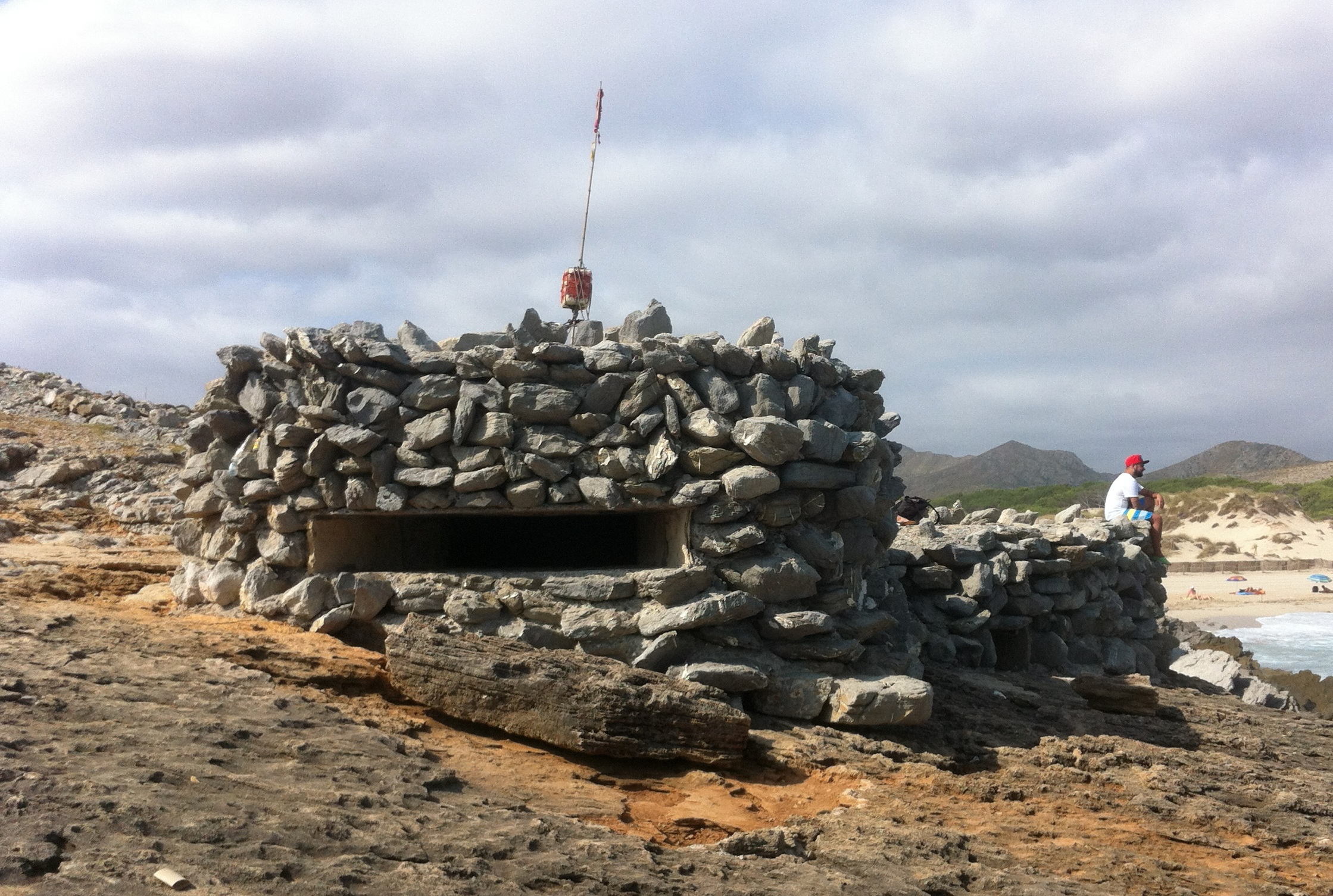 Bunker des spanischen Militärs östlich der Bucht Cala Mesquida auf Mallorca